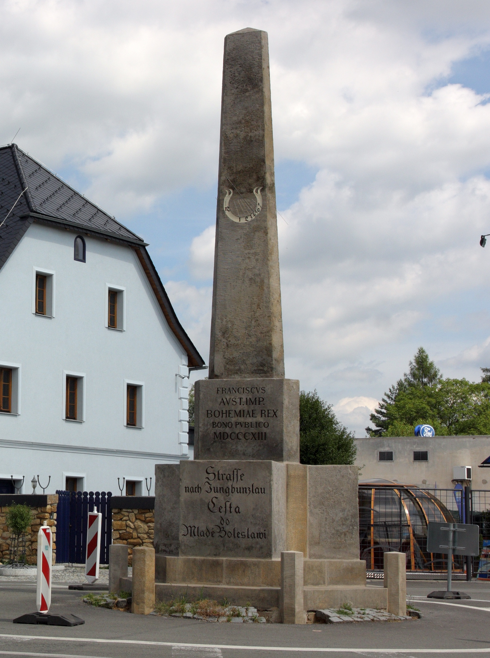 Kamenný rozcestník (pyrám) z roku 1813 na křižovatce státních cest. Restaurován roku 2013.